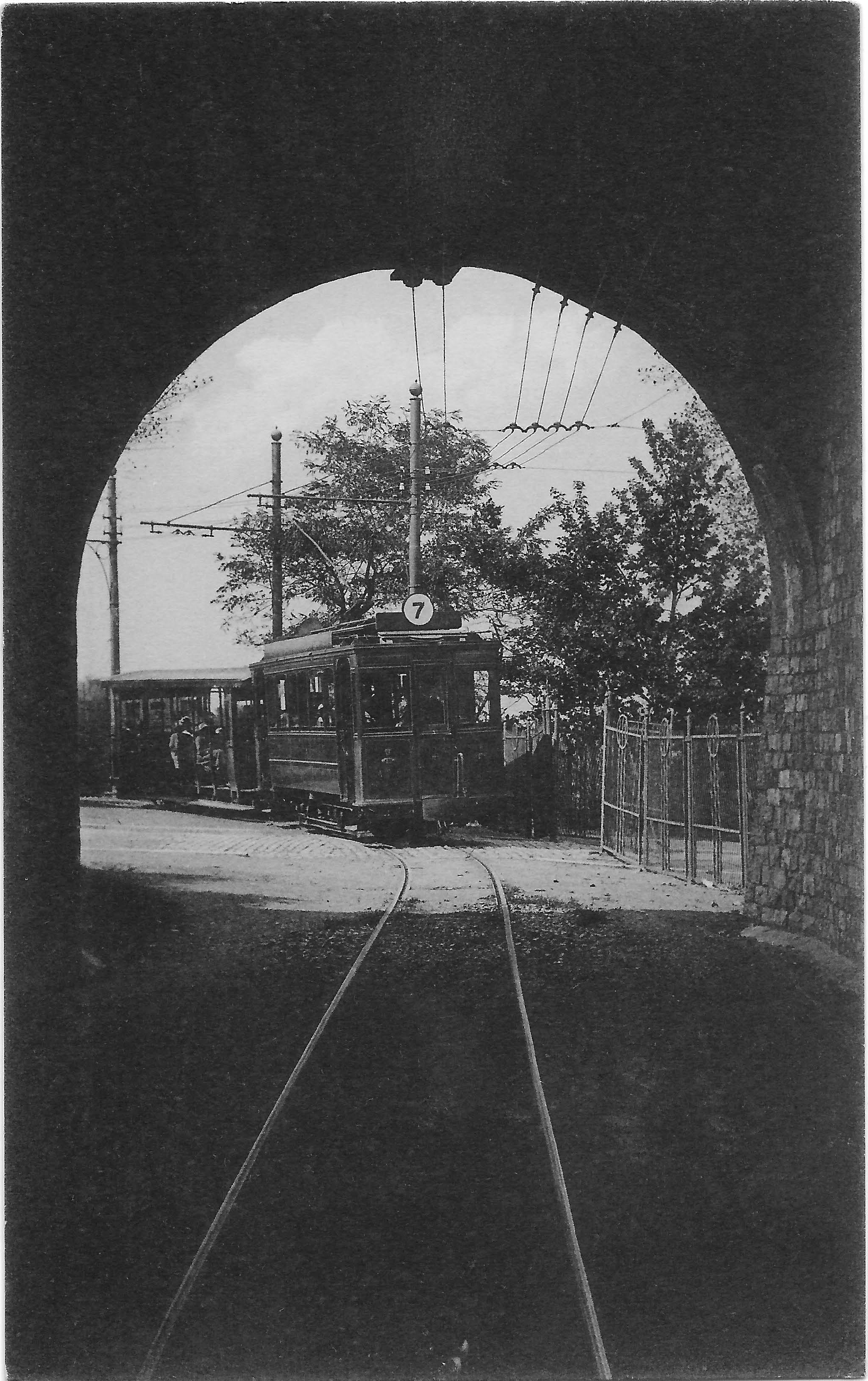 Stadstramlijn 7 naar het fort in Namen. Deze tramtunnel is gebruikt van 1921 tot 1953